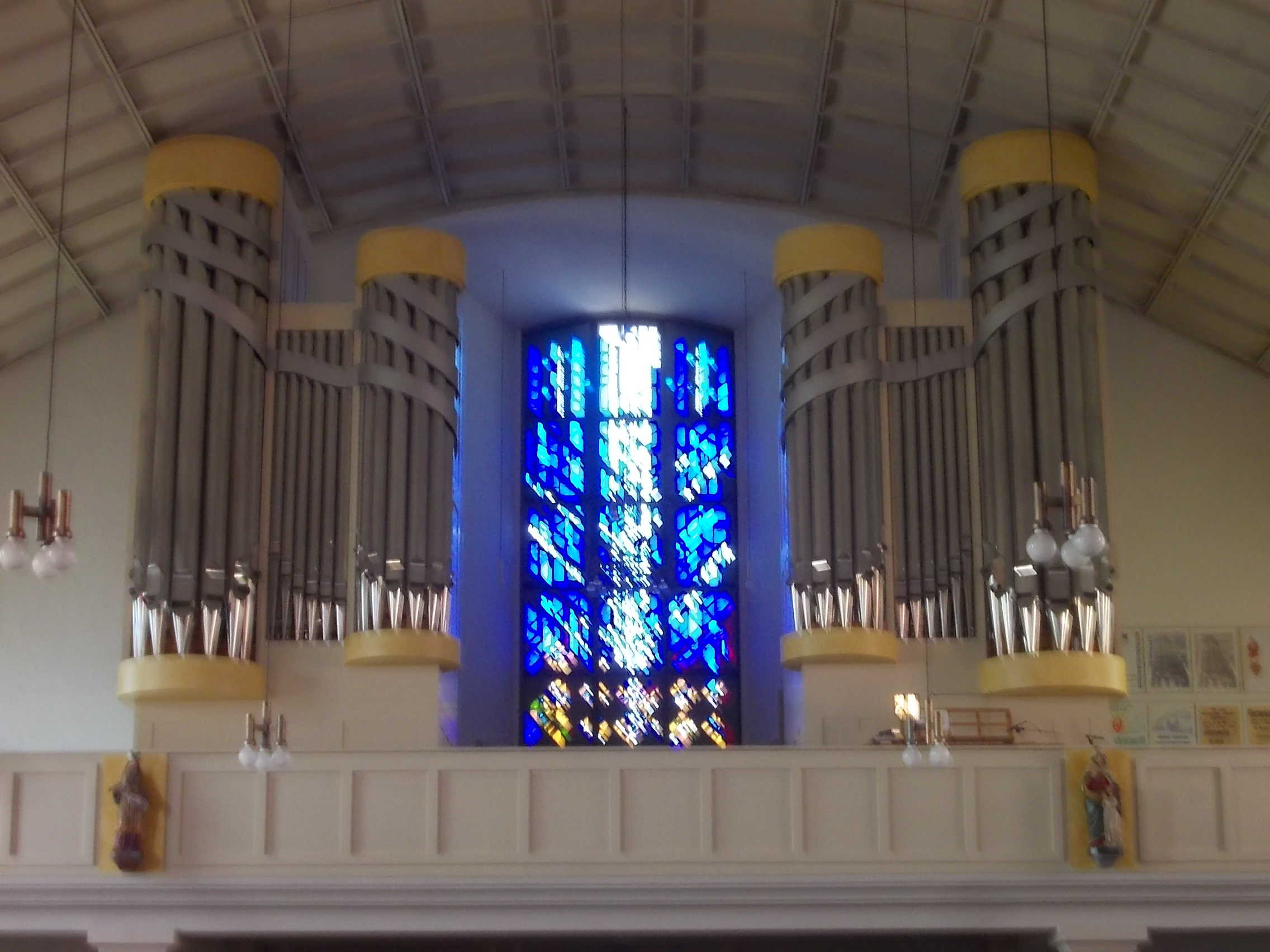 Link-Orgel der Fraulauterner Kirche Hl. Dreifaltigkeit